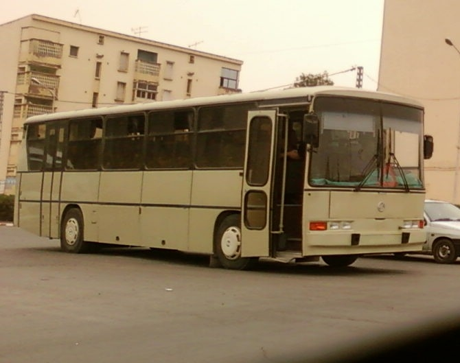 سوناكوم سفير